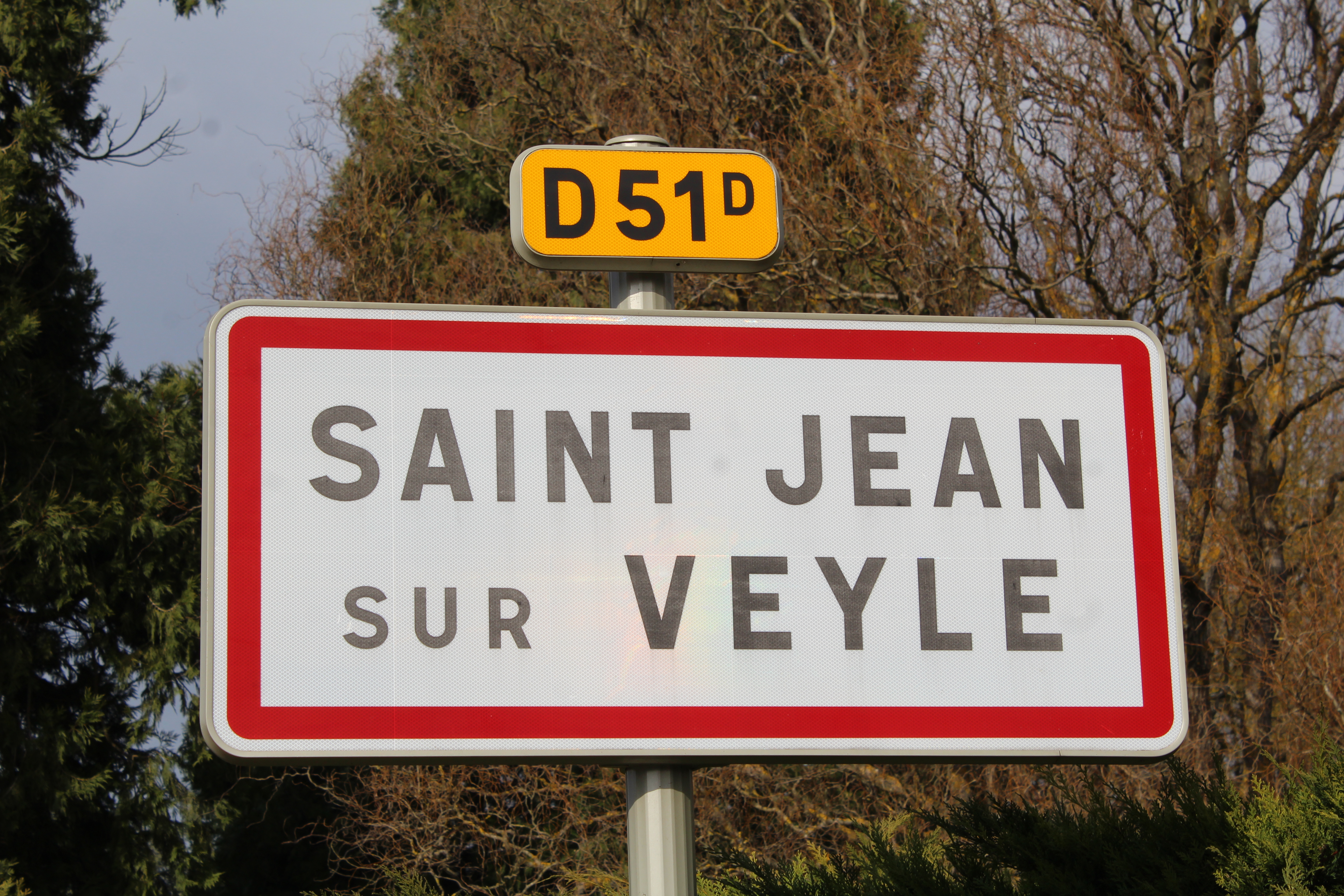 Panneau d'entrée dans Saint-Jean-sur-Veyle.